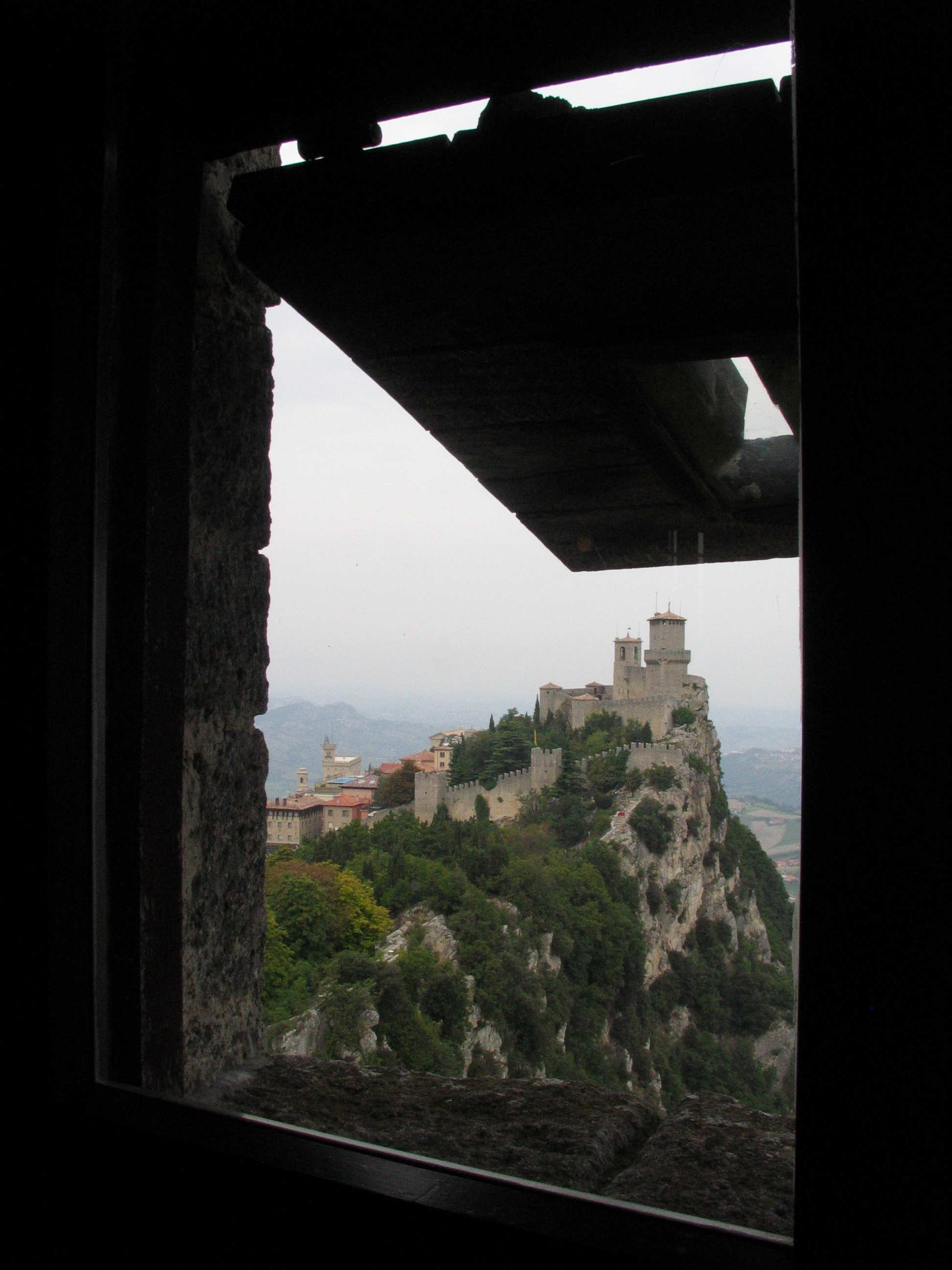 La Rocca o Guaita, San Marino, 1. Turm auf dem Monte Titano, Blick vom 2. Turm (La Cesta o Fratta)